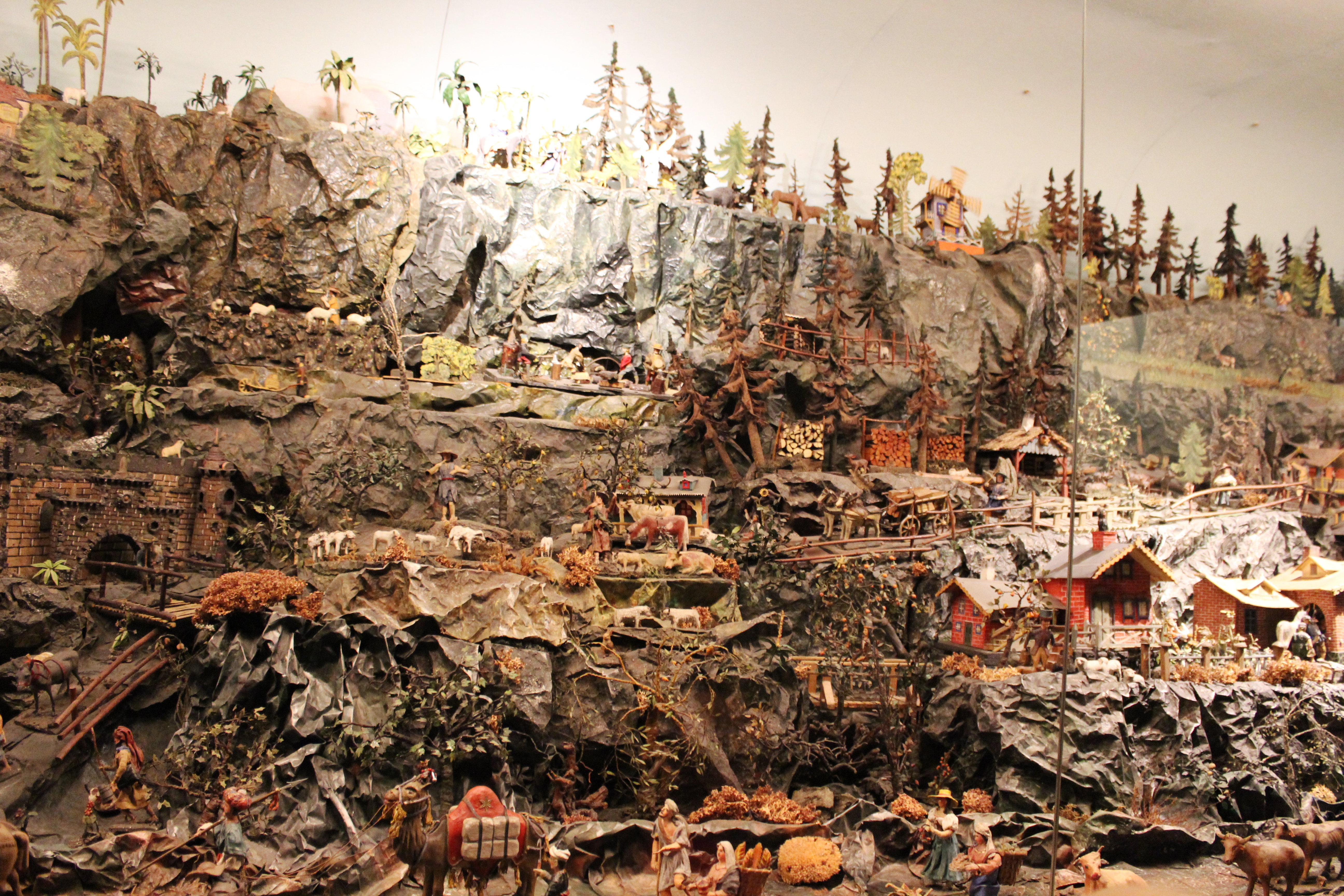 Krýzovy jesličky. Muzeum Jindřichohradecka na Balbínově náměstí v Jindřichově Hradci. Česká republika.